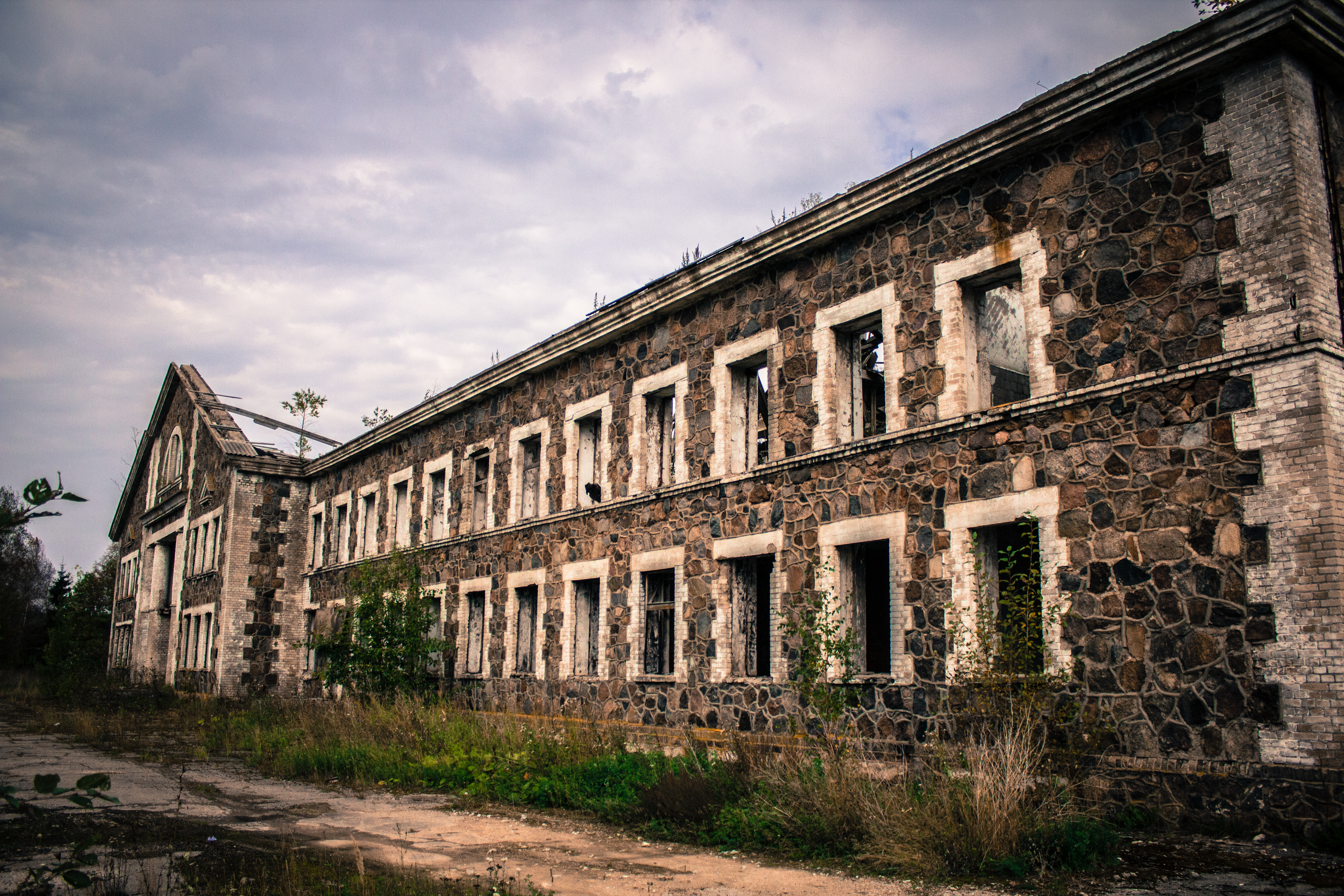 Sompa kaevanduse hoone, 1946-1948